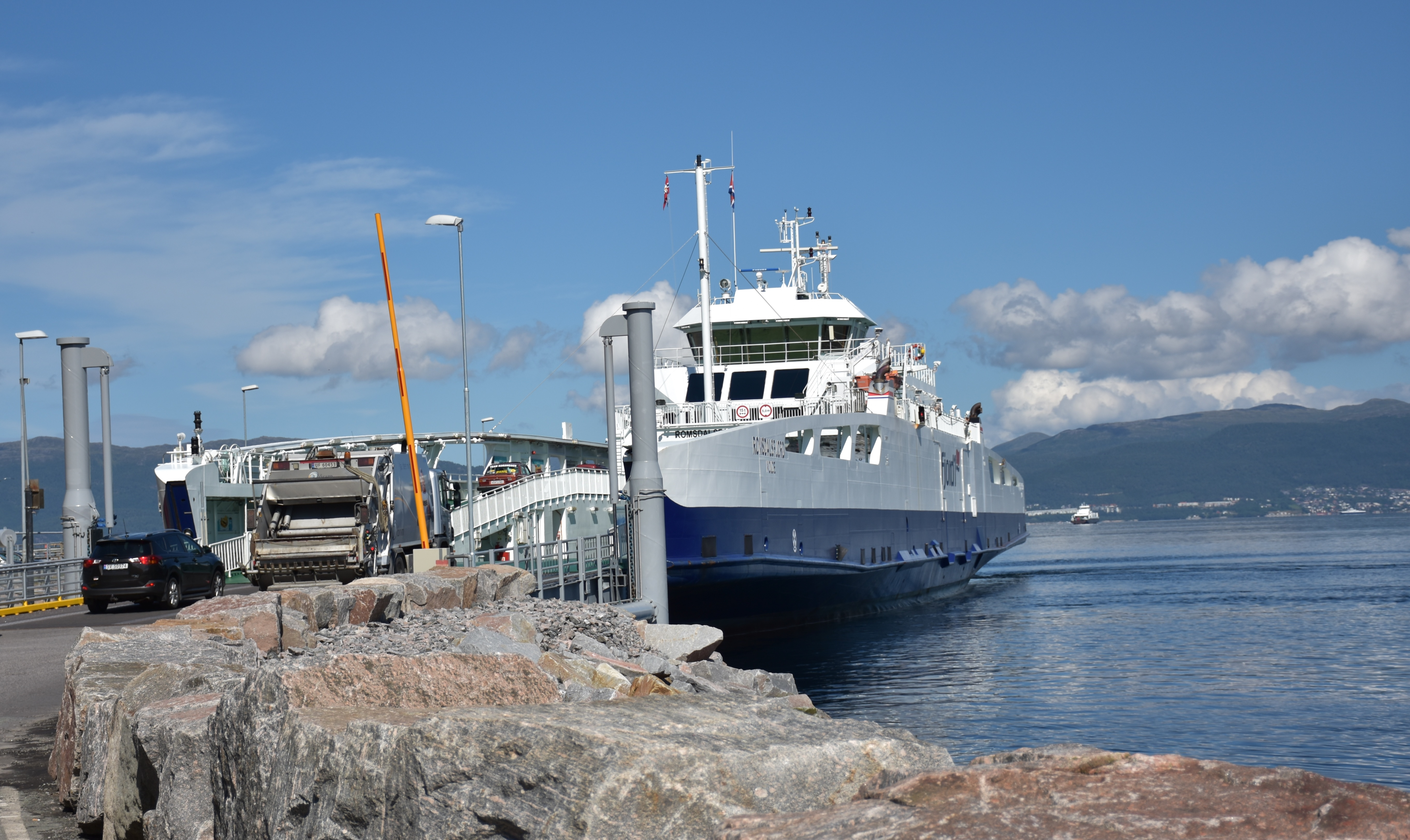 MF Romsdalsfjord ved kai på Furneset i Vestnes